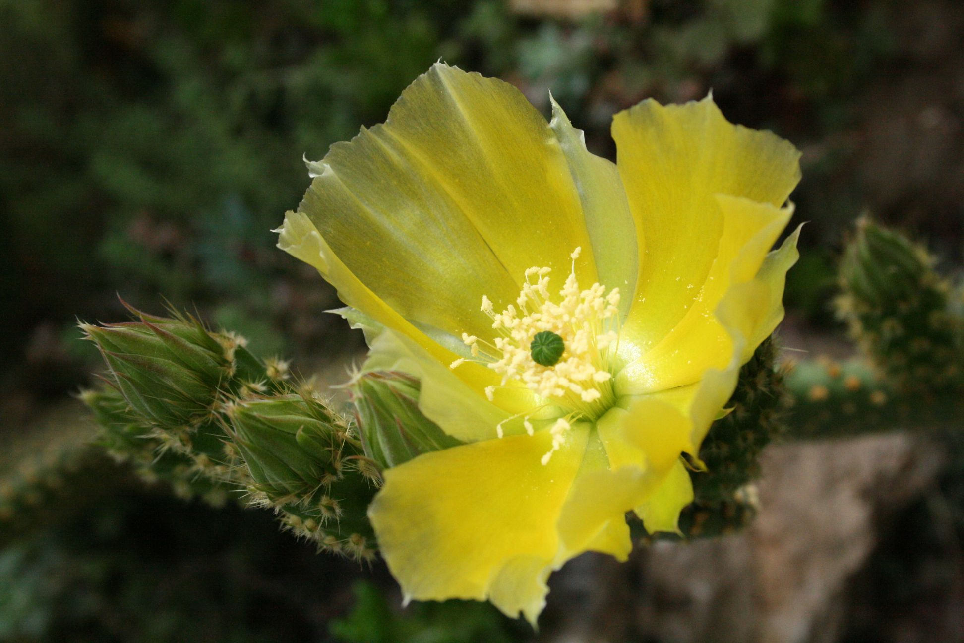 Opuntia microdasys var. pallida (Opuntioideae; Cactaceae; Planta) kaktusz virága